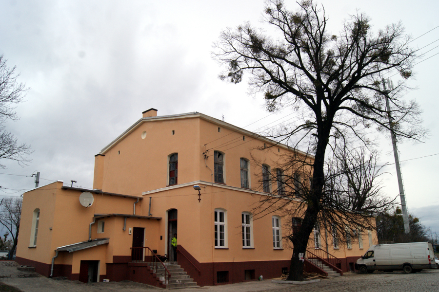 Budynek dworcowy w Środzie Śląskiej od strony miasta po odnowieniu elewacji w grudniu 2014 r.